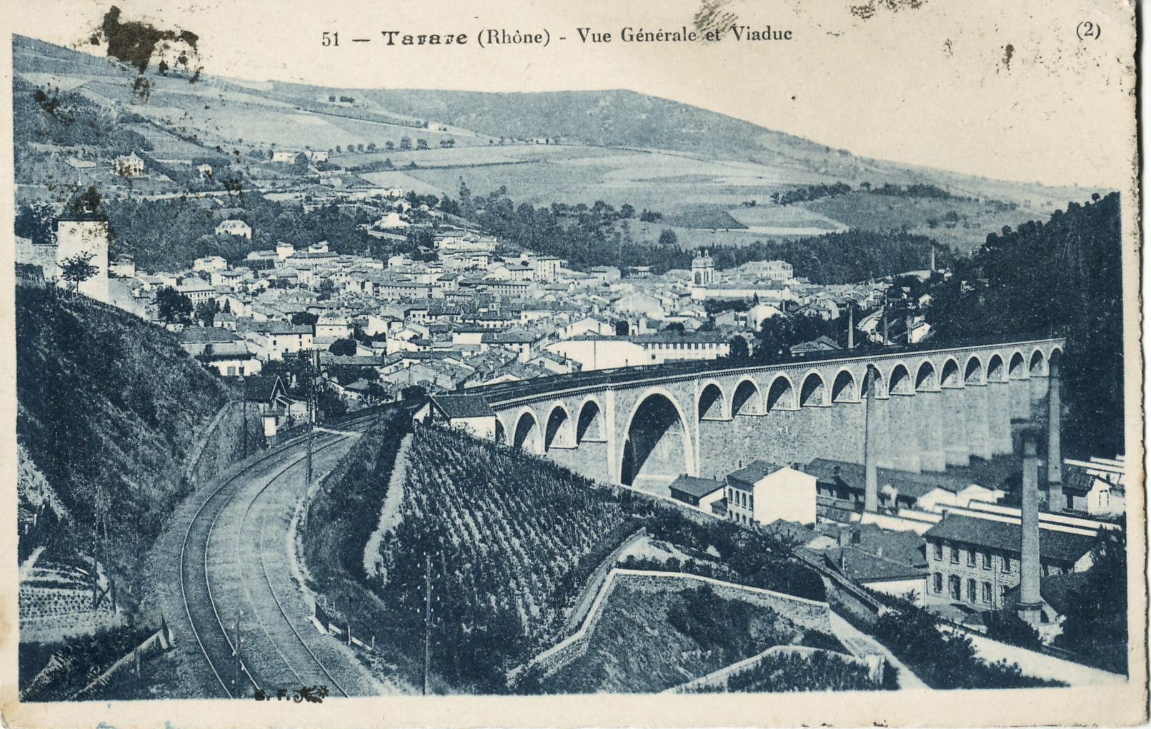 Carte postale ancienne édtitée par BF à Paris, n°51 :Tarare|TARARE - Vue générale et viaduc